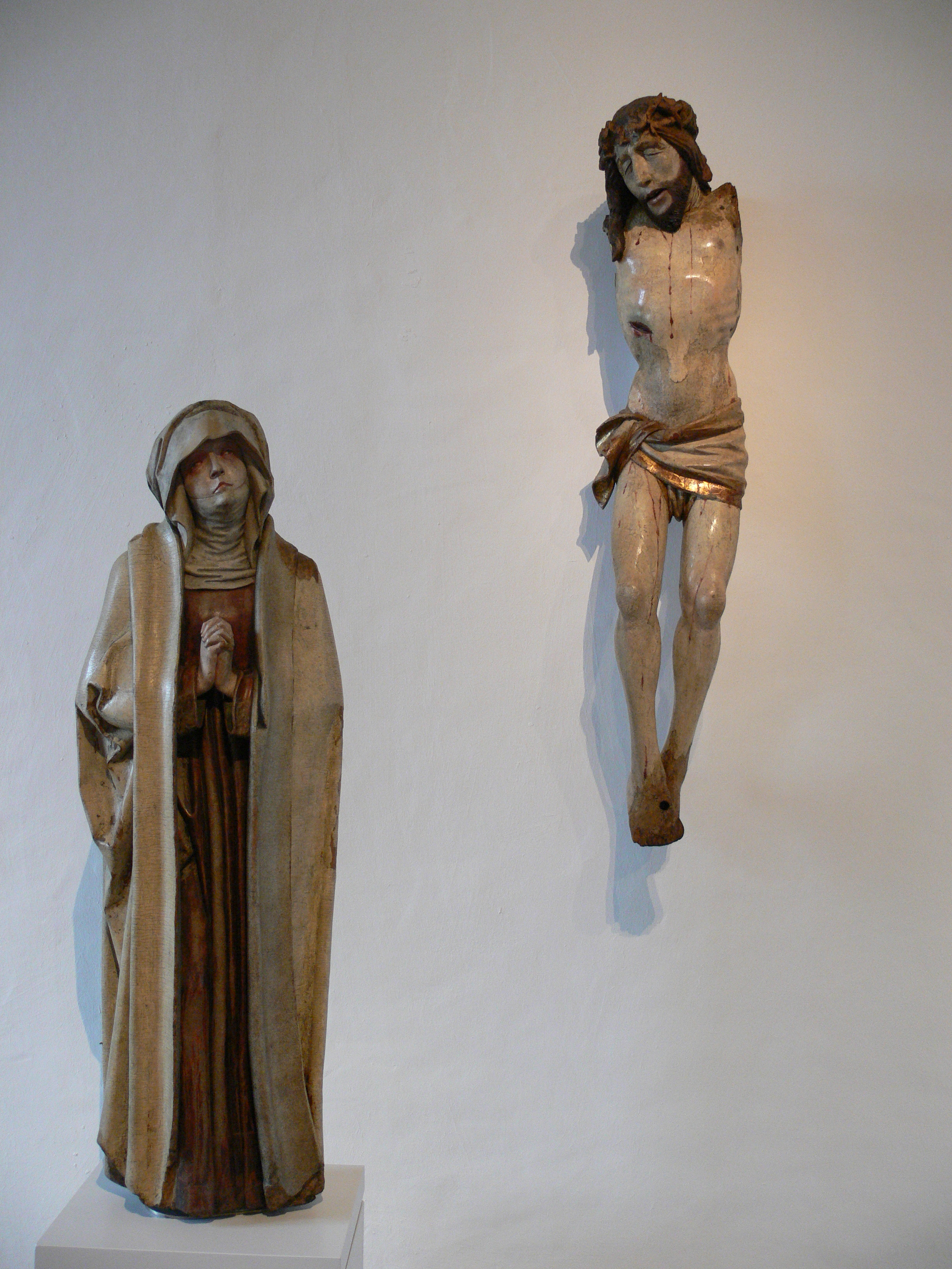 Meister H. W.: Schmerzensmutter, um 1501–1503, Laubholz, Reste der originalen Fassung;: wohl vom Hochaltar der Chemnitzer Jakobikirche Kunstsammlungen Chemnitz, Schloßbergmuseum, II 26/K (Leihgabe der Kirchengemeinde St. Jakobi, Chemnitz) Umkreis des Meisters H. W.: Torso eines Kruzifixes mit ehemals schwenkbaren Armen, um 1500, aus der Jakobikirche in Chemnitz Kunstsammlungen Chemnitz, Schlossbergmuseum, II 20/K (Leihgabe der Kirchengemeinde St. Jakobi, Chemnitz)